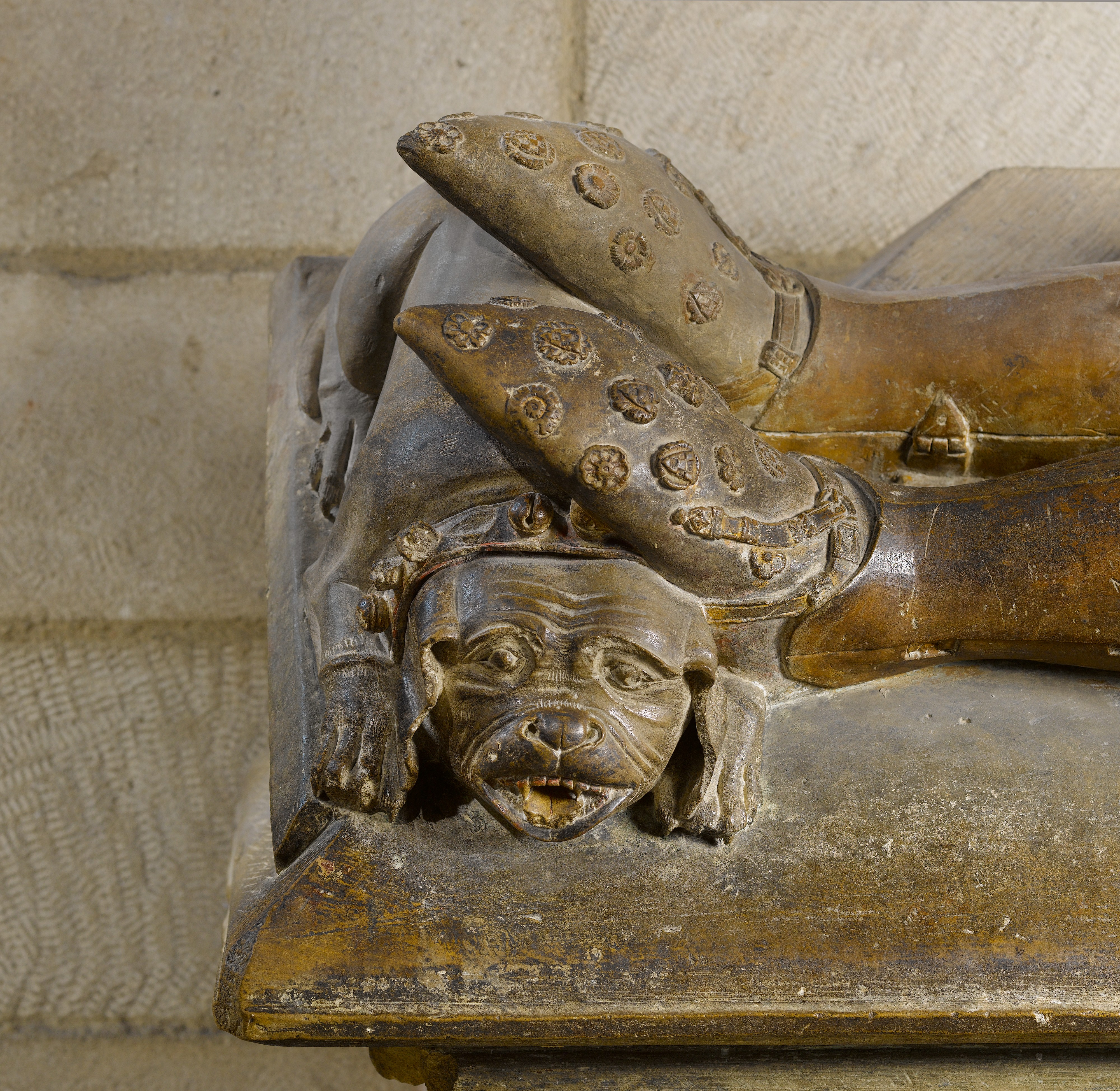 Catalan; Tomb; Sculpture